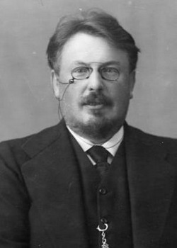 Анатолий Иванович Савенко (1874-1922), русский политик и государственный деятель, публицист